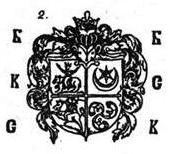 Родавыя гербы XVI i XVII стст. Віленская школа.